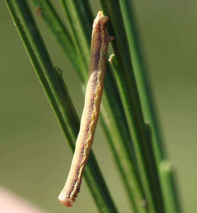 Raupe des Heidespanners (Ematurga atomaria) an Besenginster, am 10.9.2017 in der Schwetzinger Hardt